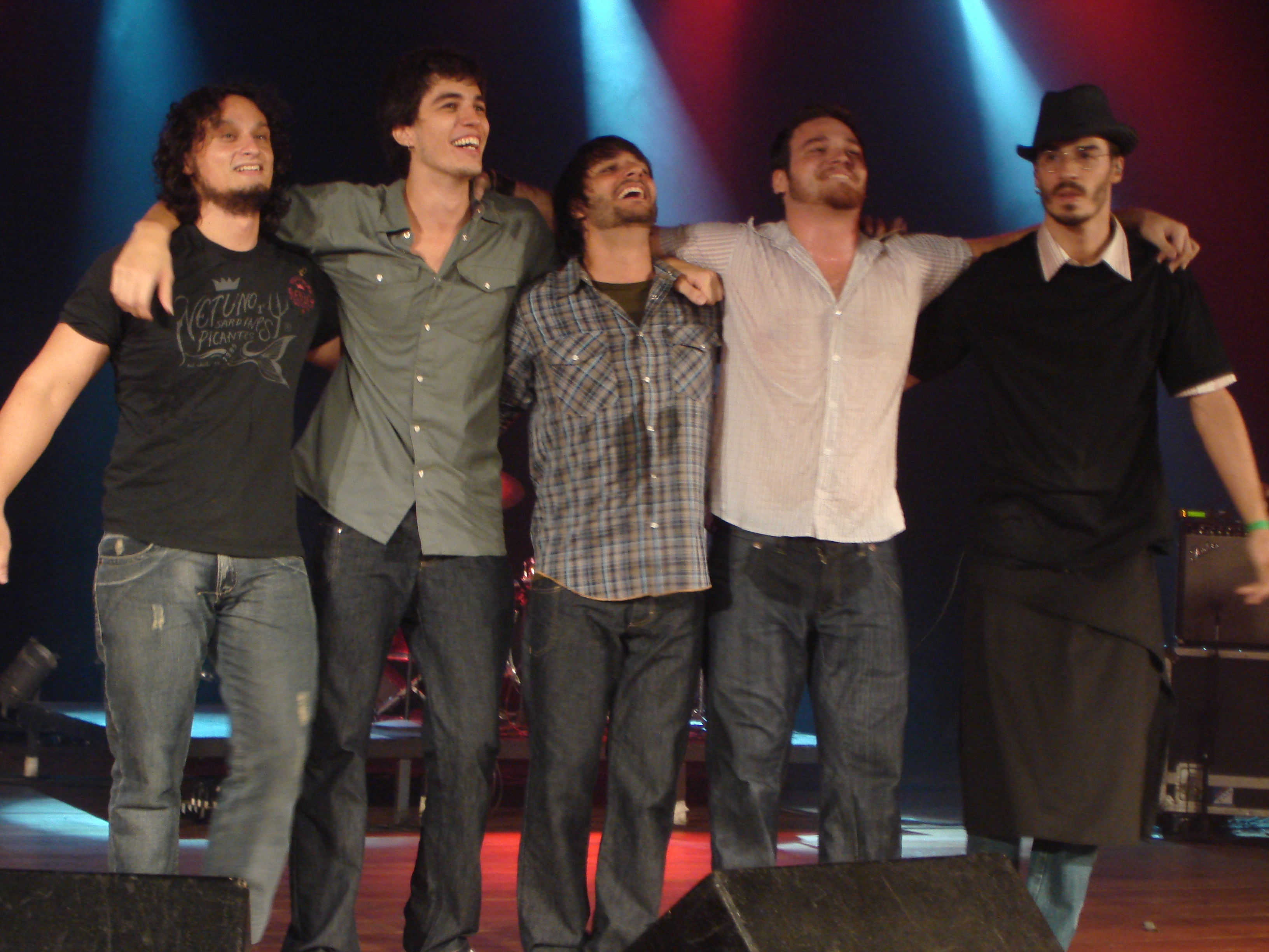 Som da Rua agradece ao público após show no Canecão